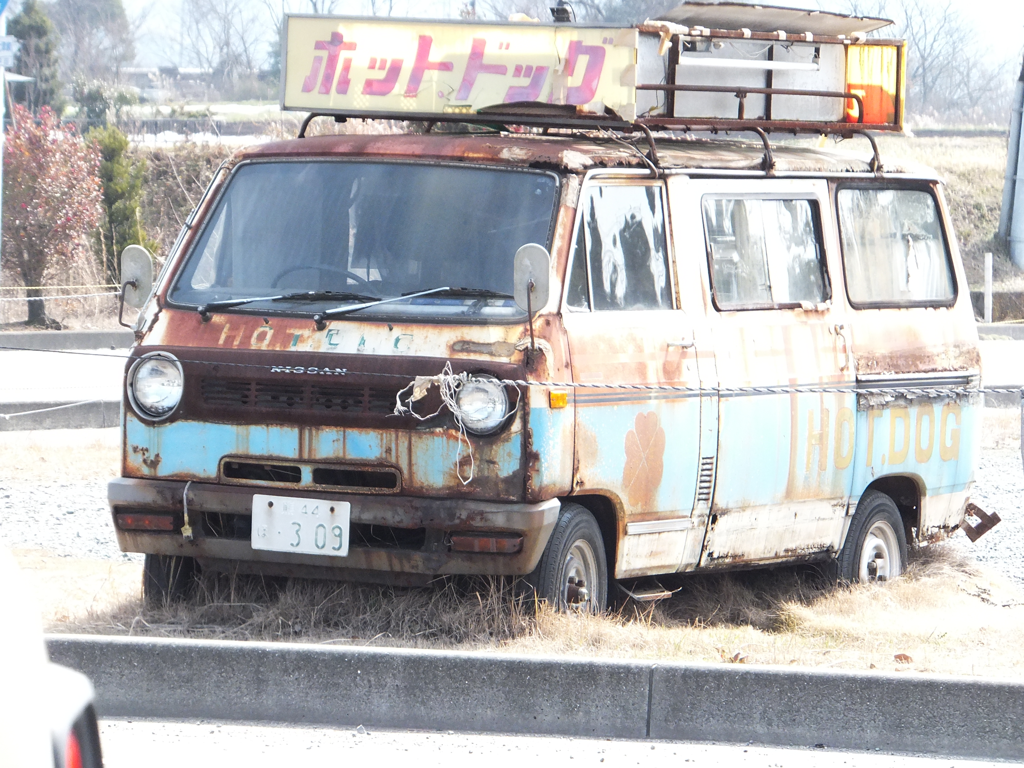 画像の車両（ニッサン・チェリーキャブ）は、熊本県益城町の国道443号と県道36号・第二空港線交差点付近で飲食販売を行う車両です。 但し、車両自体は自力走行は不能です。（車自体が看板代わり）